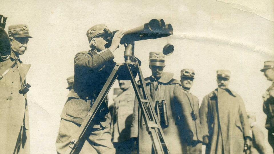 S. M. il Re e il Gen. Porro nell'Alta Valle dello Judrio